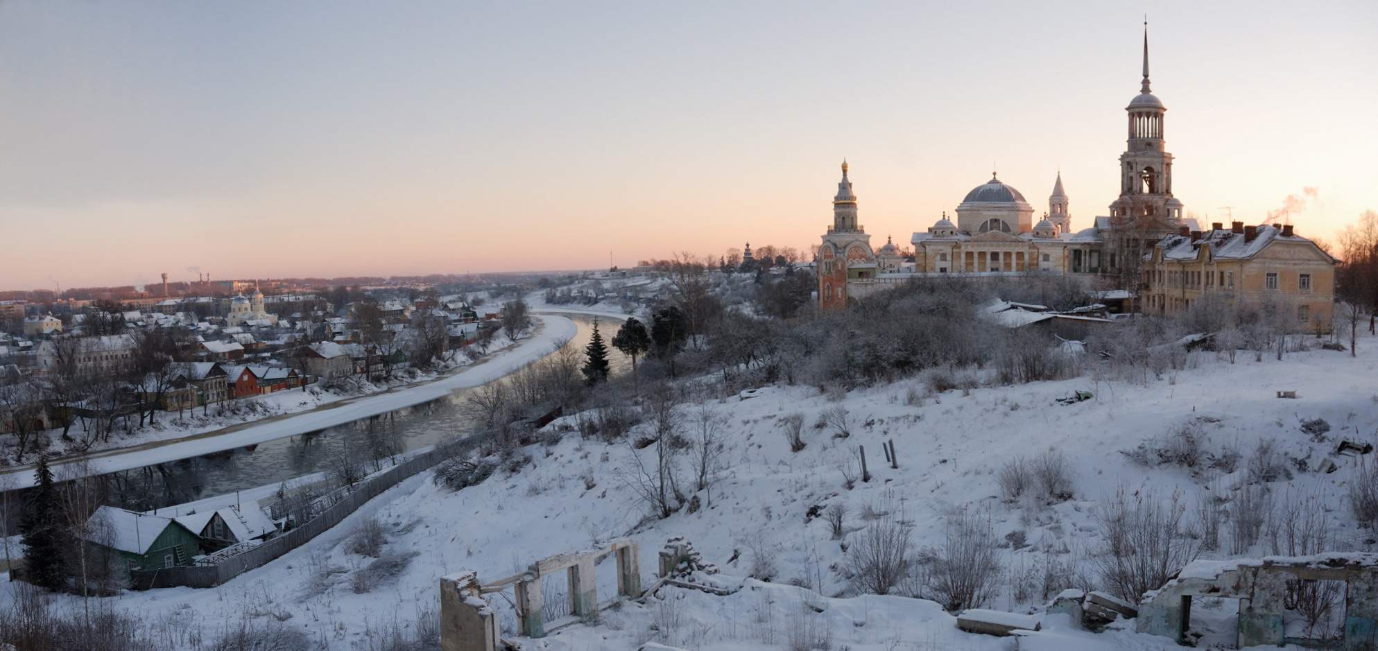 Torzhok, Borisoglebski monastery